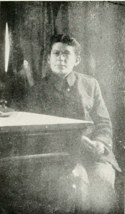 А.И. Автономов. Командующий красными войсками северного Кавказа.